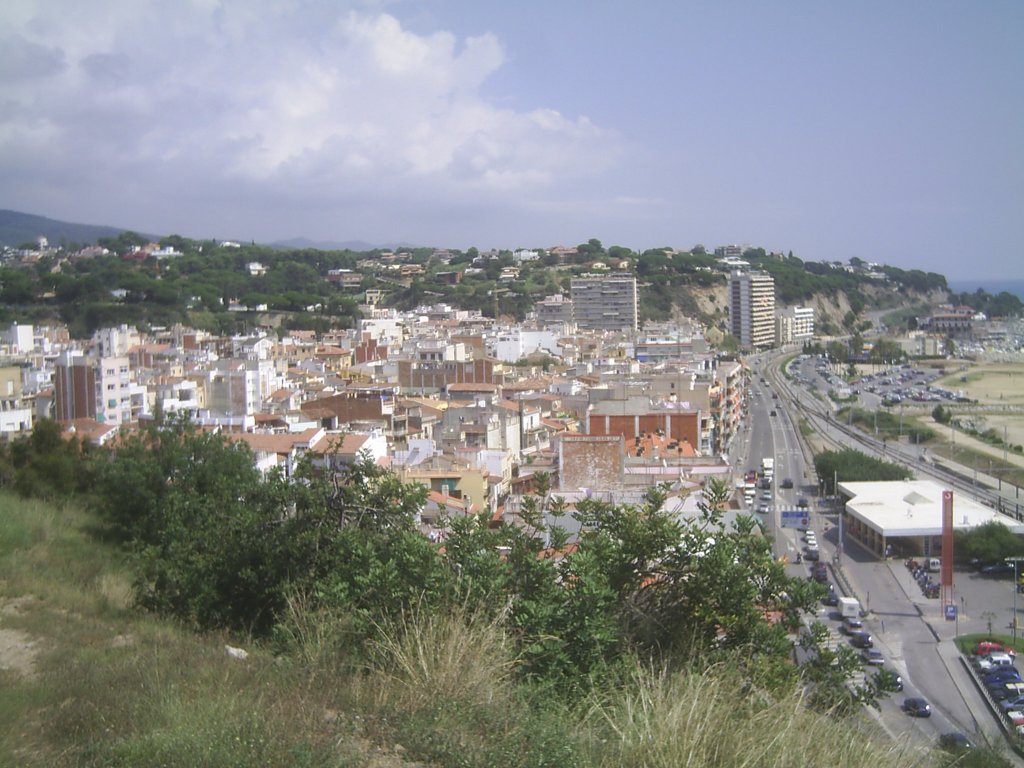 Foto d'Arenys de Mar des del Turó de la Pietat